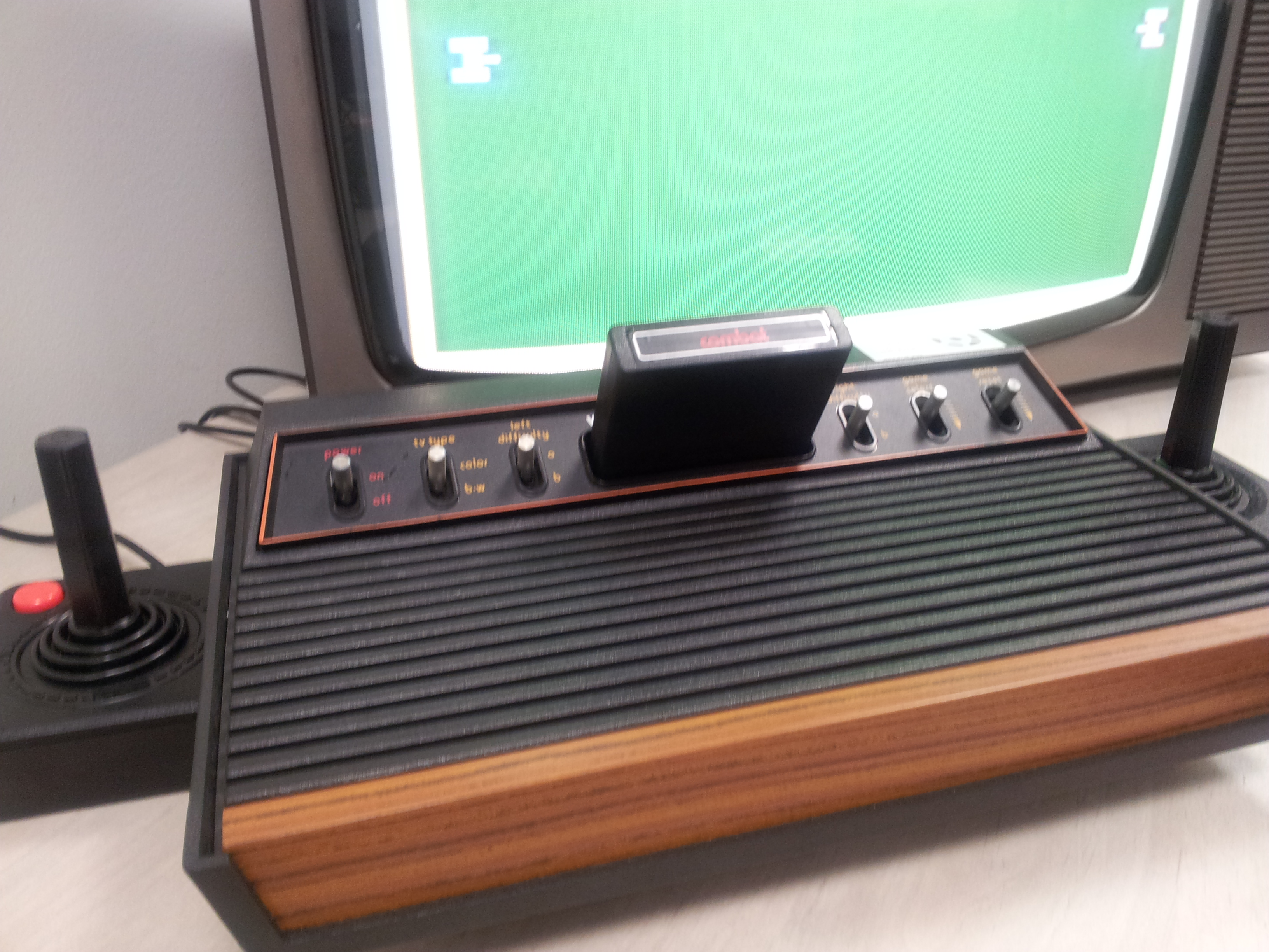 קונסולת אטארי 2600 עם משחק הקומבט המיתולוגי